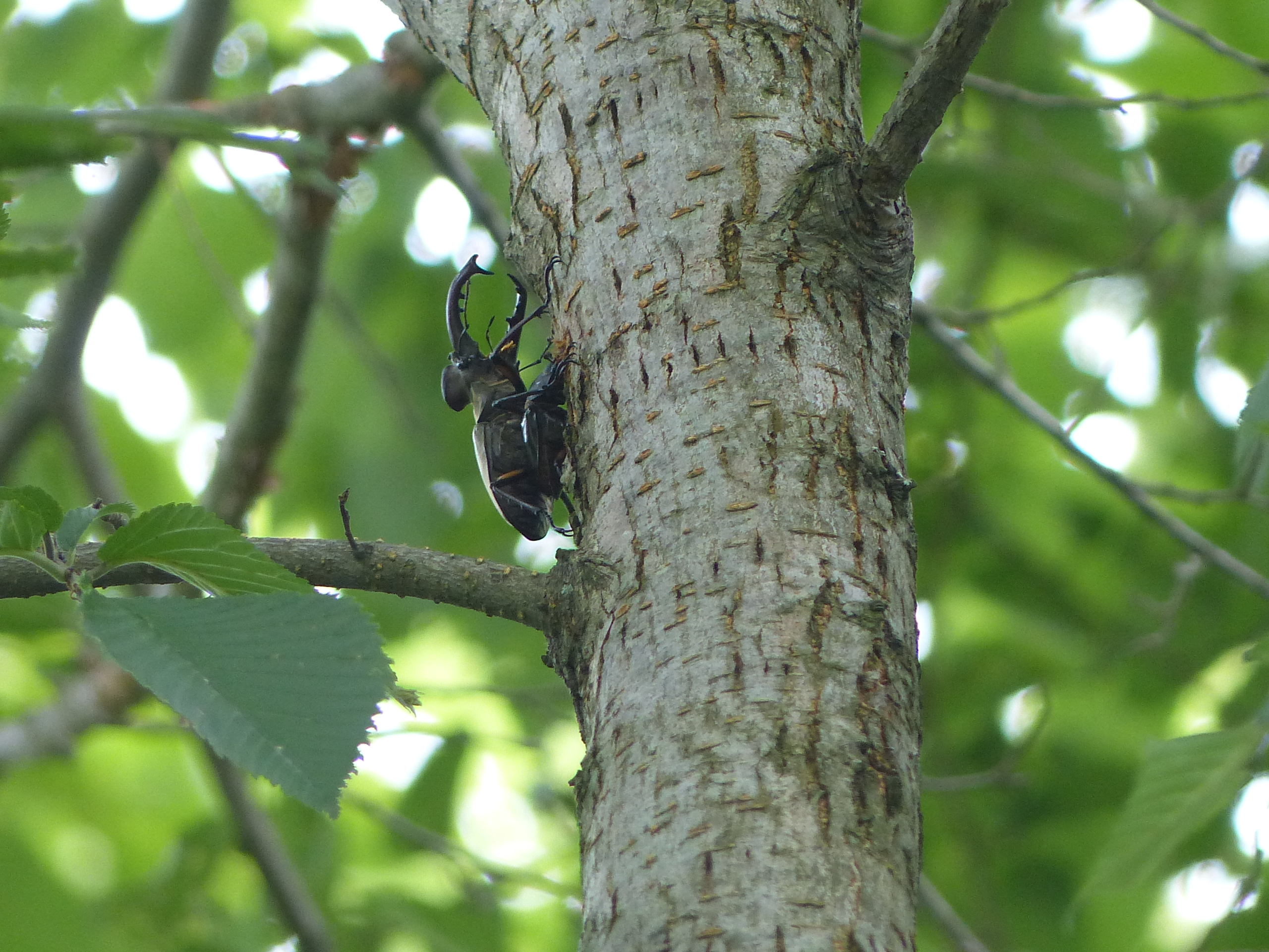 撮影地：北海道 道南 2015年7月